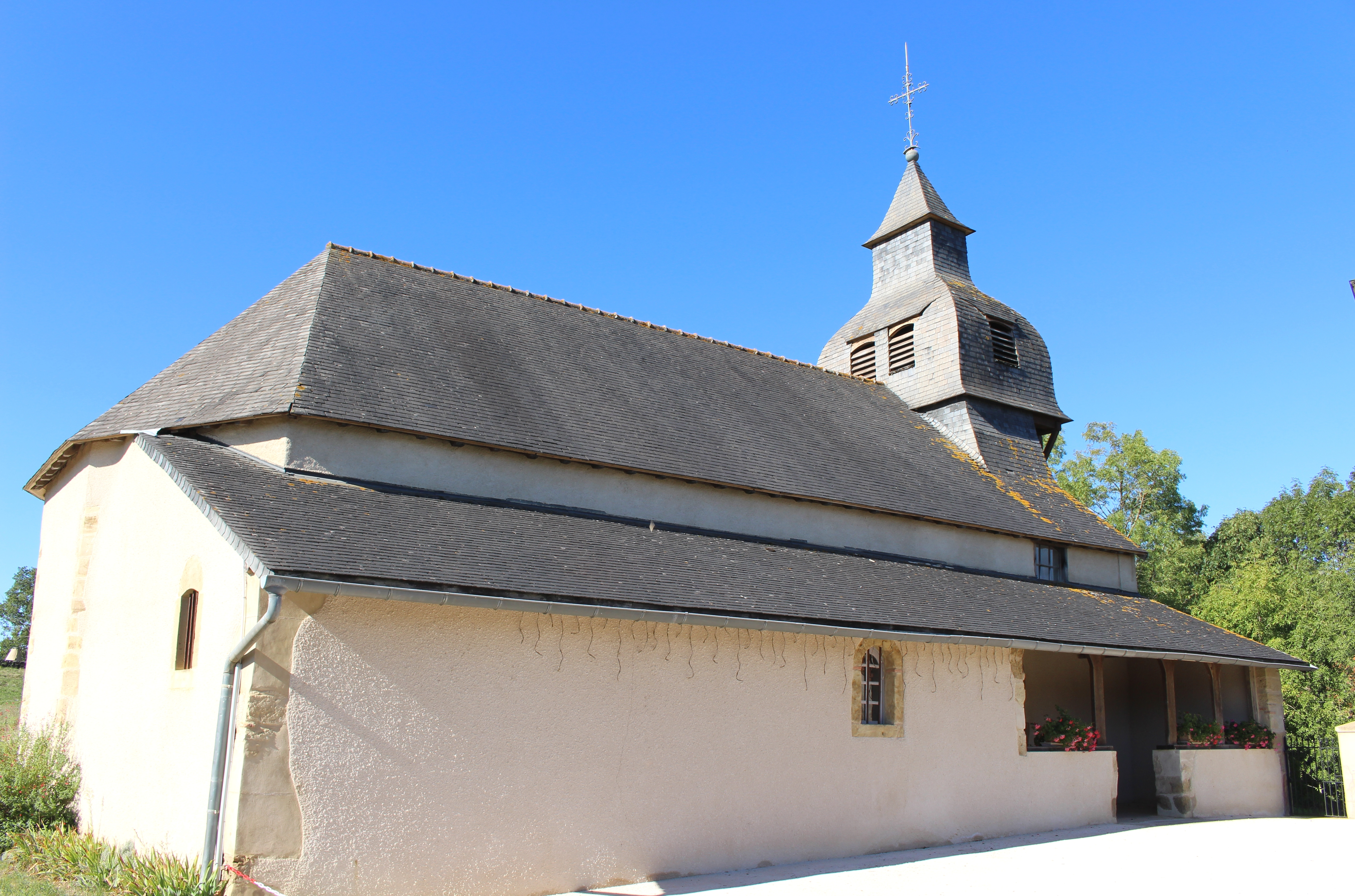 Église Saint-Michel de Mun (Hautes-Pyrénées)